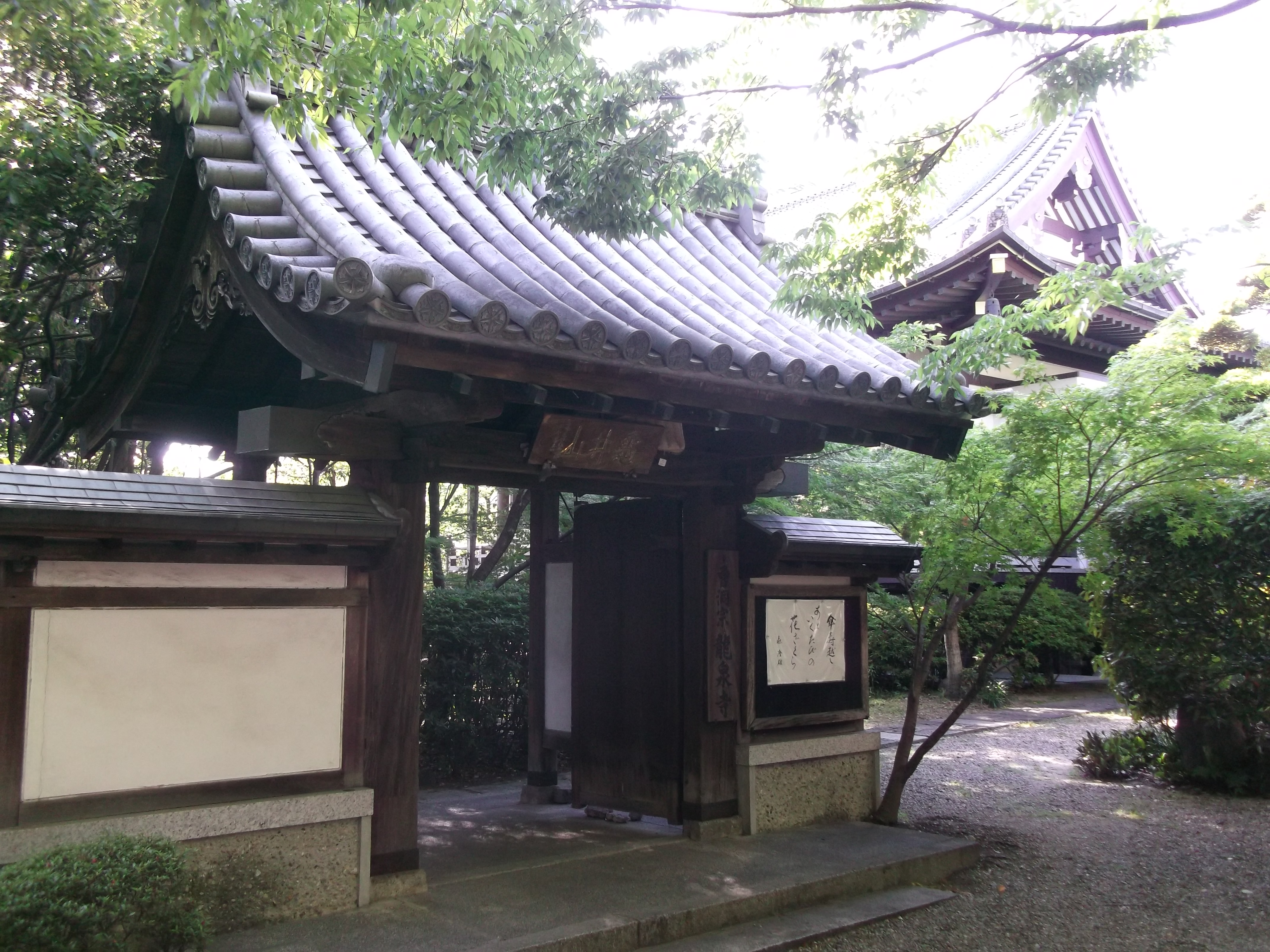 名古屋市瑞穂区井戸田町にある龍泉寺を東側から写す